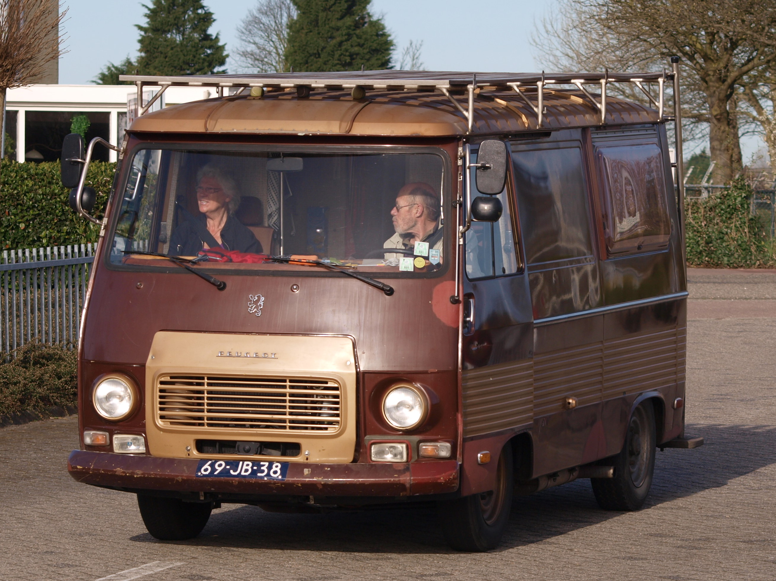 1974 Peugeot J7PZ30